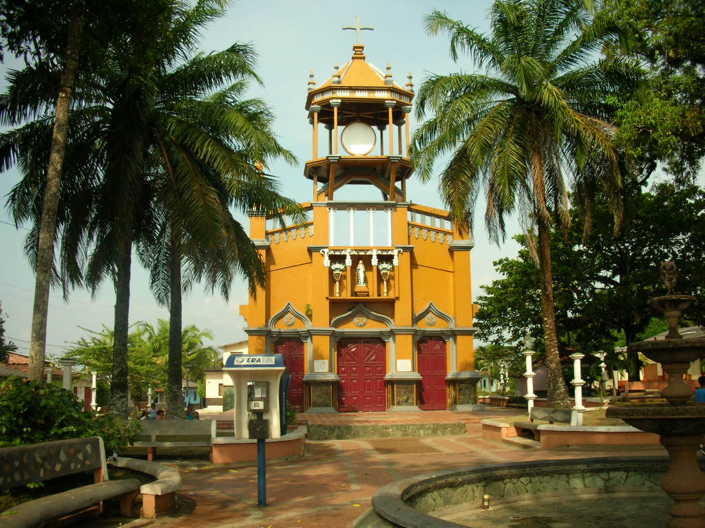 el parque y la iglesia del Municipios de Caceres, Antioquia, Colombia